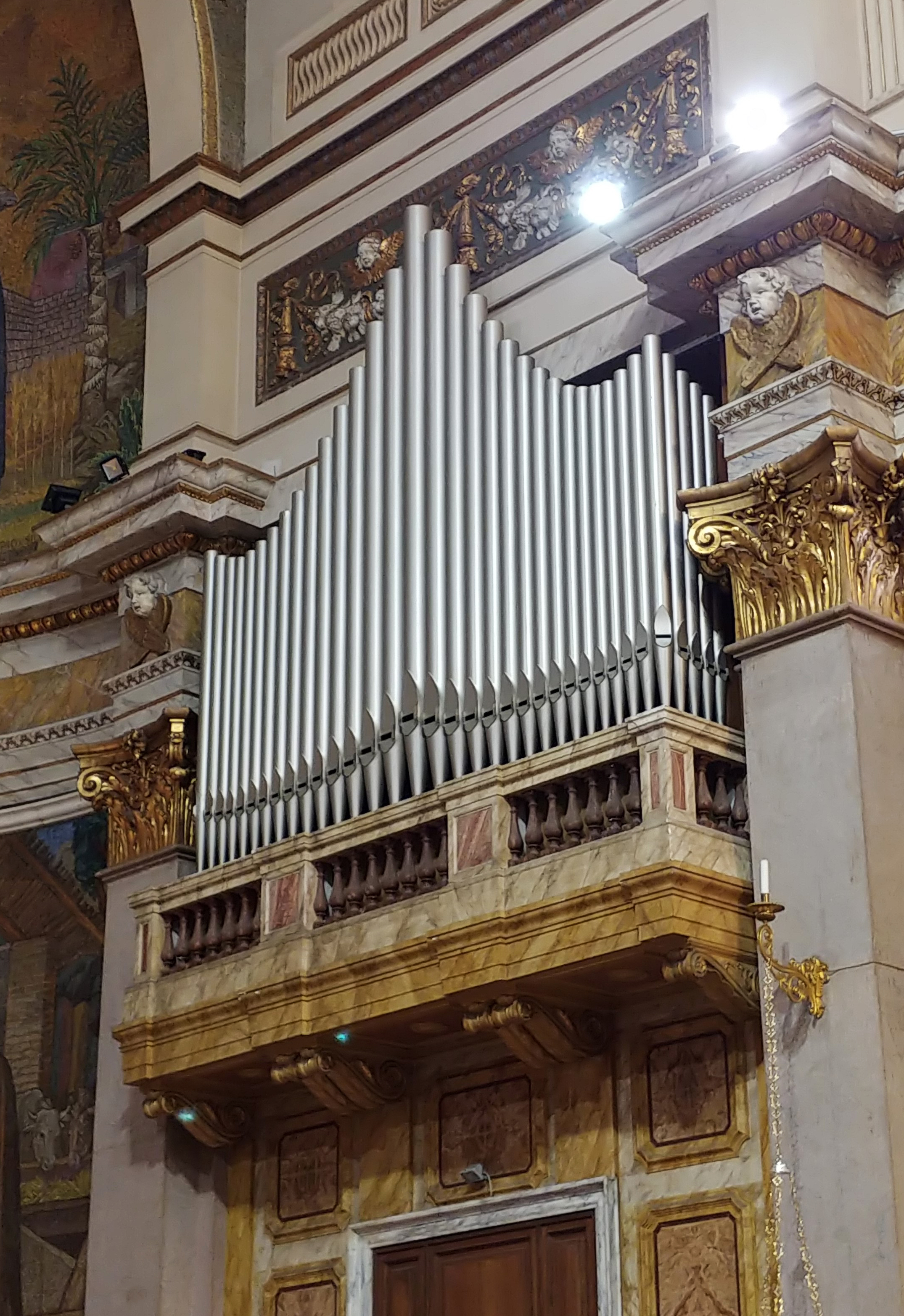 Corpo di destra dell'organo a canne.